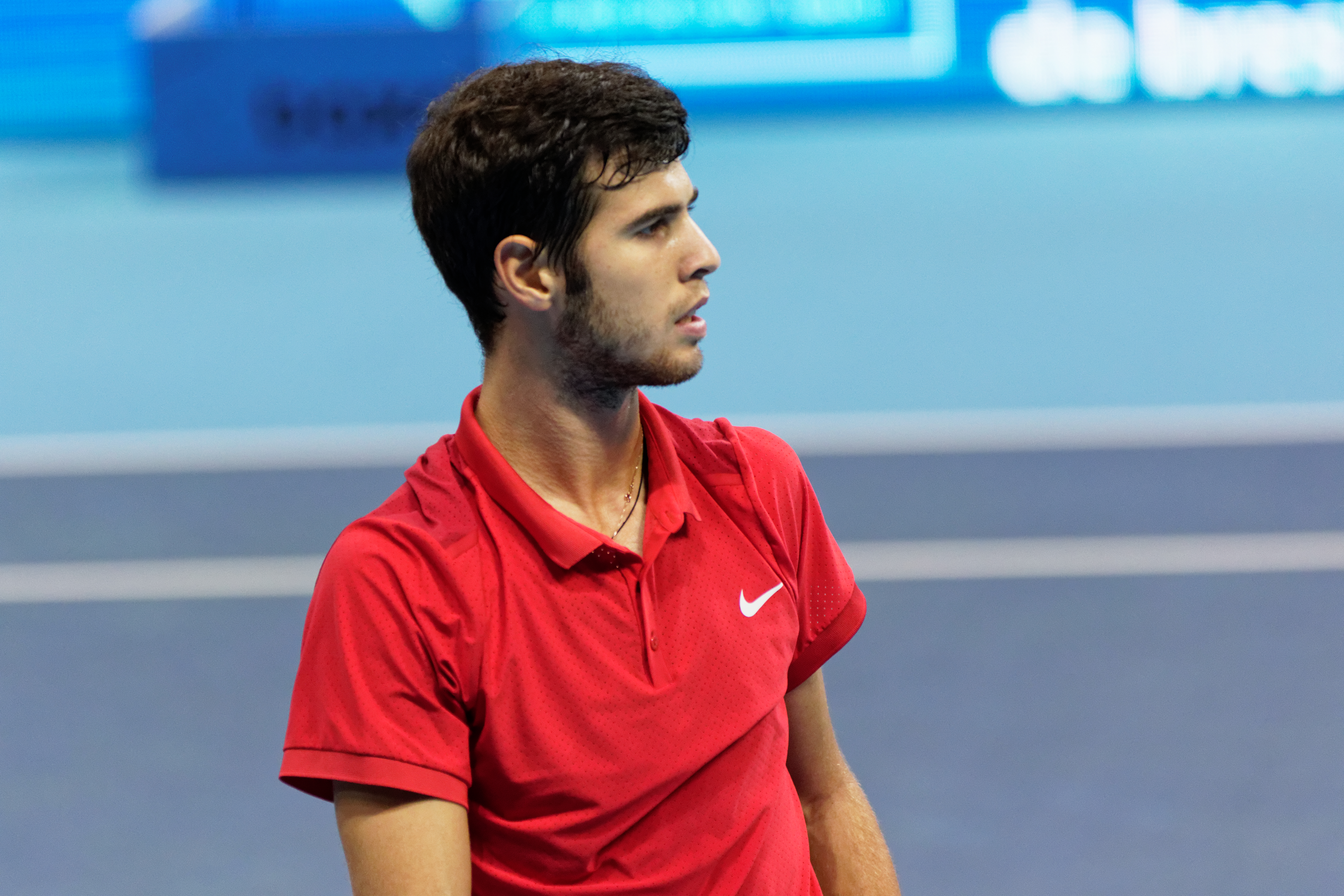 Rencontre entre Calvin Hemery et Karen Khachanov lors du huitième de final de l'Open de Brest Arena 2015. Karen Khachanov gagnera deux sets à un.